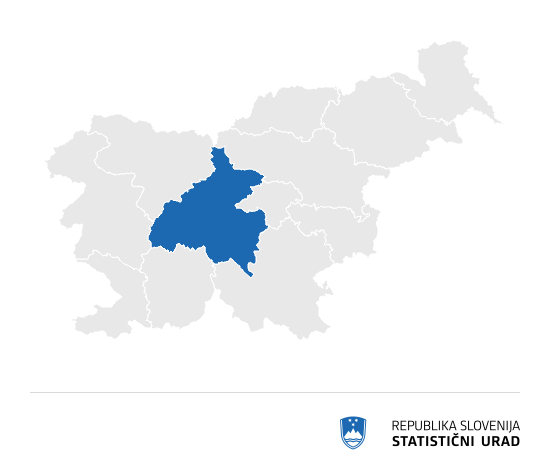 regije